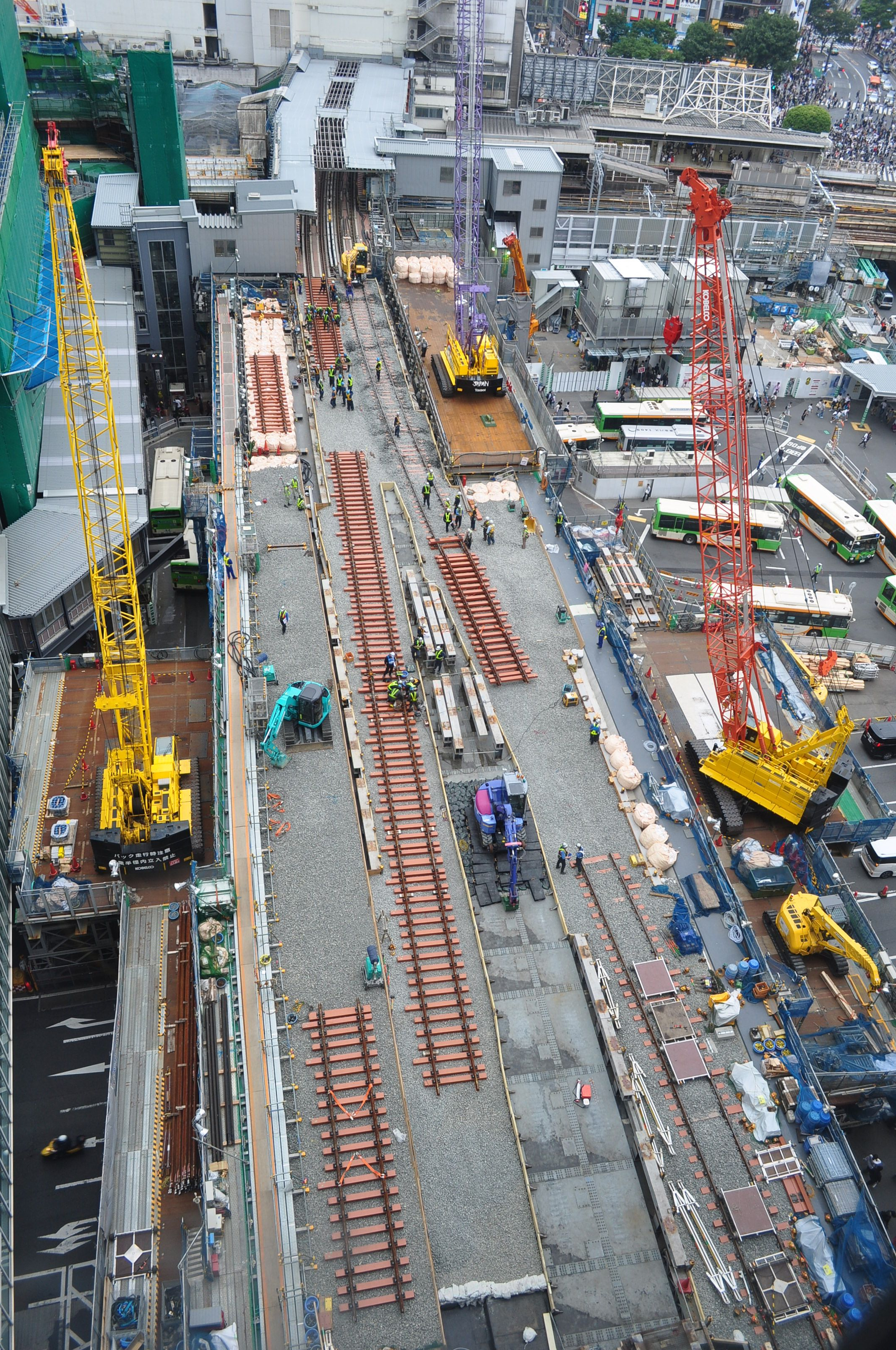 東京メトロ銀座線 渋谷駅